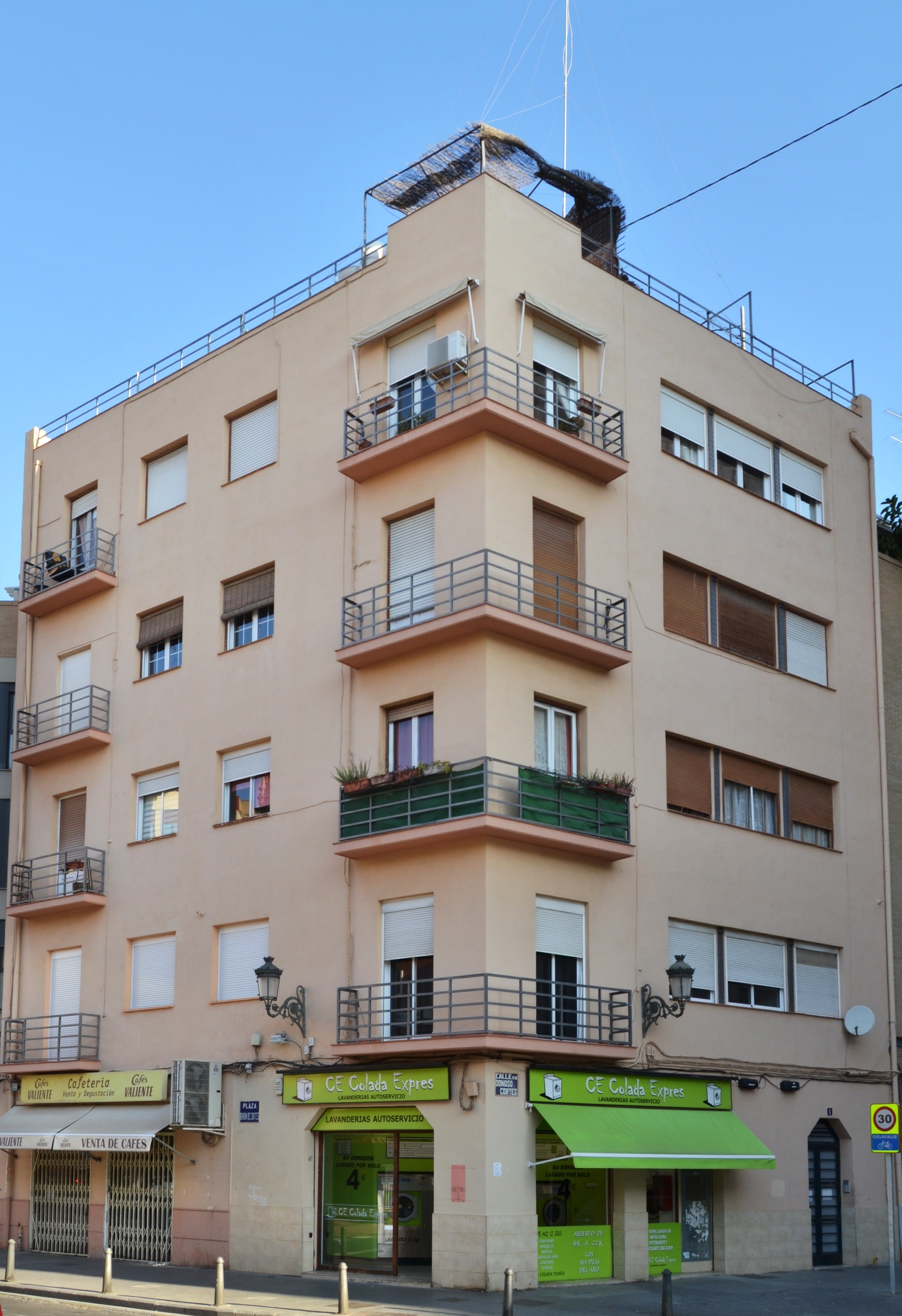 Edifici Navarro González, Russafa.